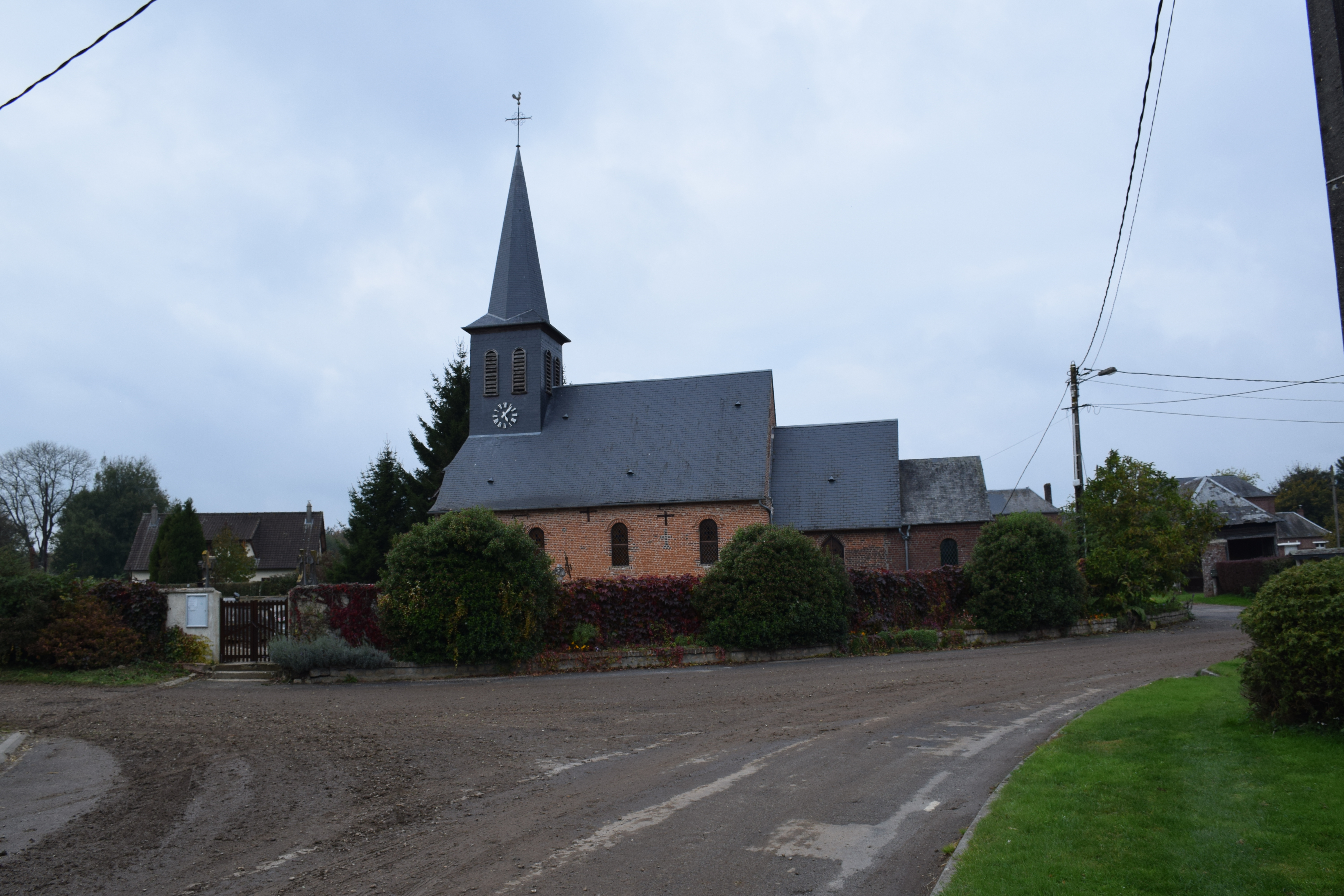 Eglise